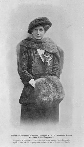 Natalia Brasova on a pre-1917 postcard